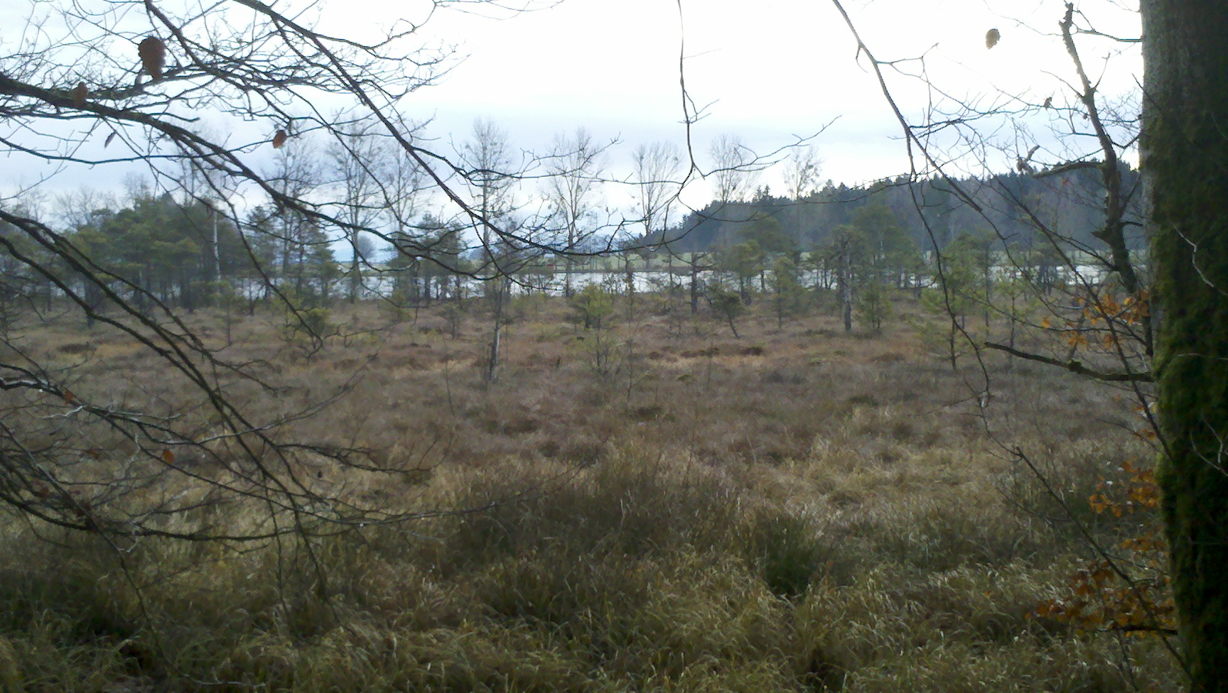 Kastenseeoner See Dezember 2013